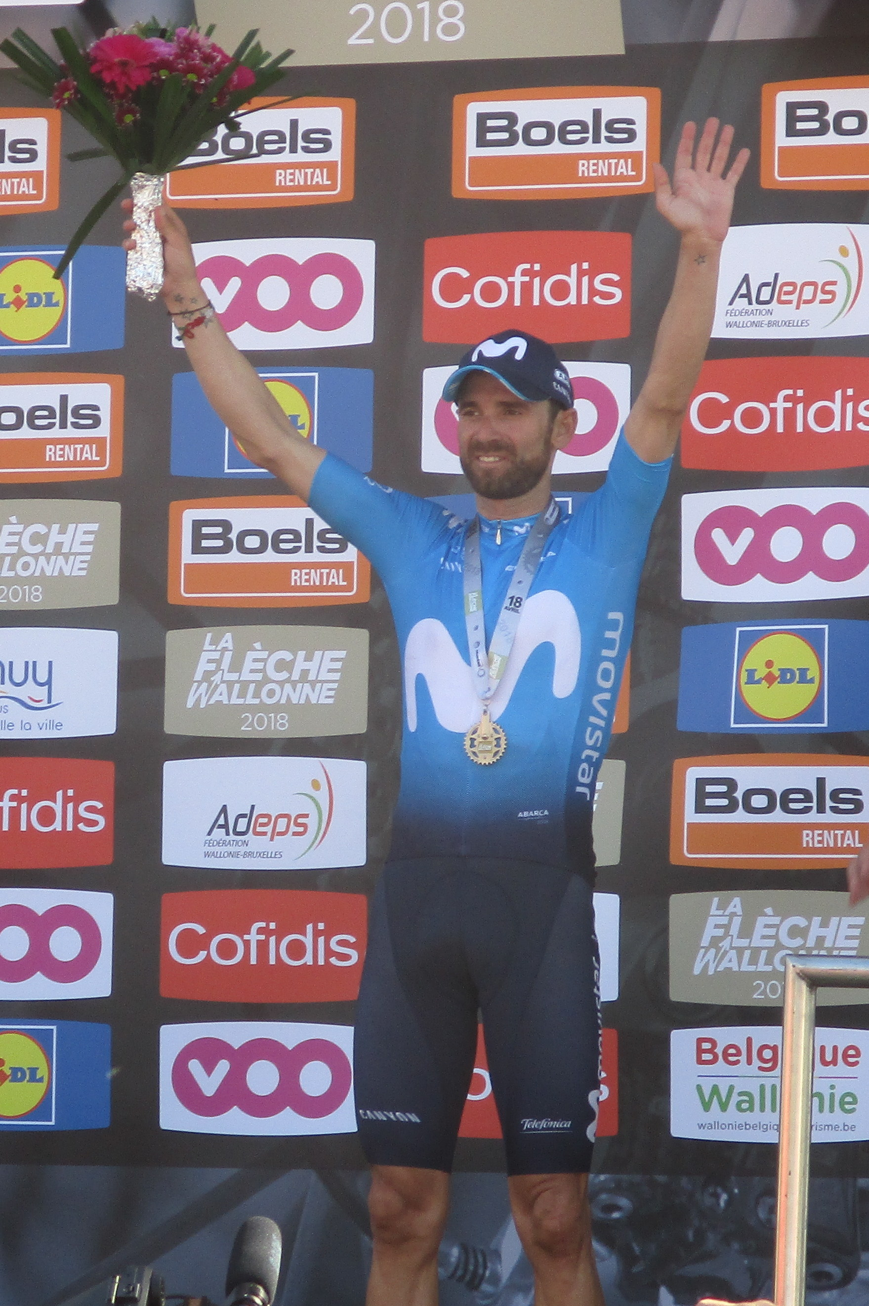 Waalse Pijl 2018 op de Mur van Huy. 1. Julian Alaphilippe; 2. Alejandro Valverde; 3. Jelle Vanendert